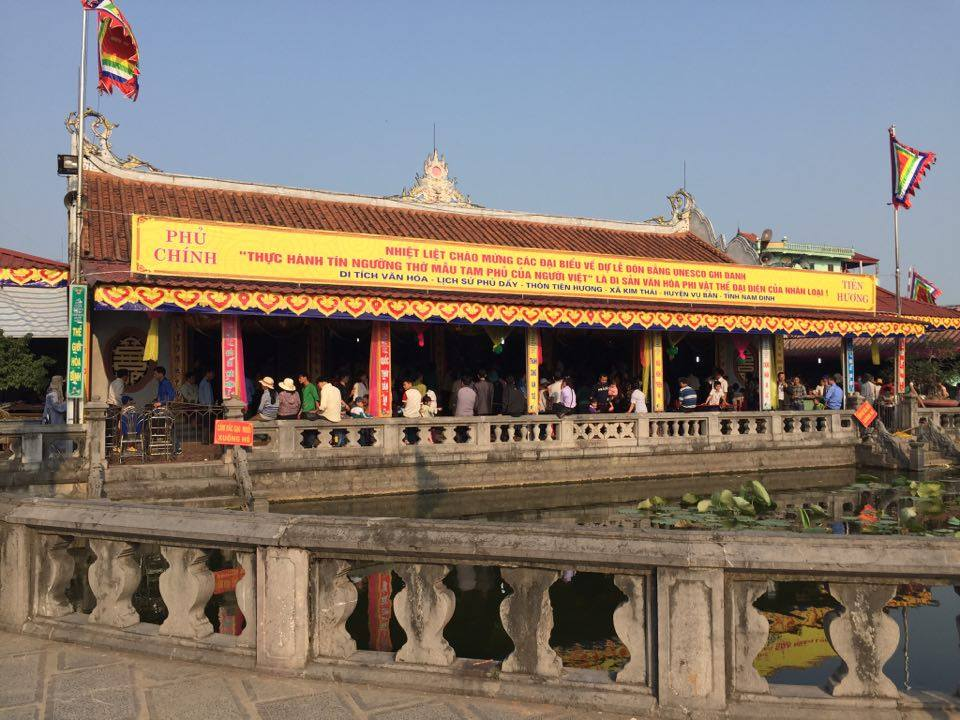 Phủ Chính Tiên Hương